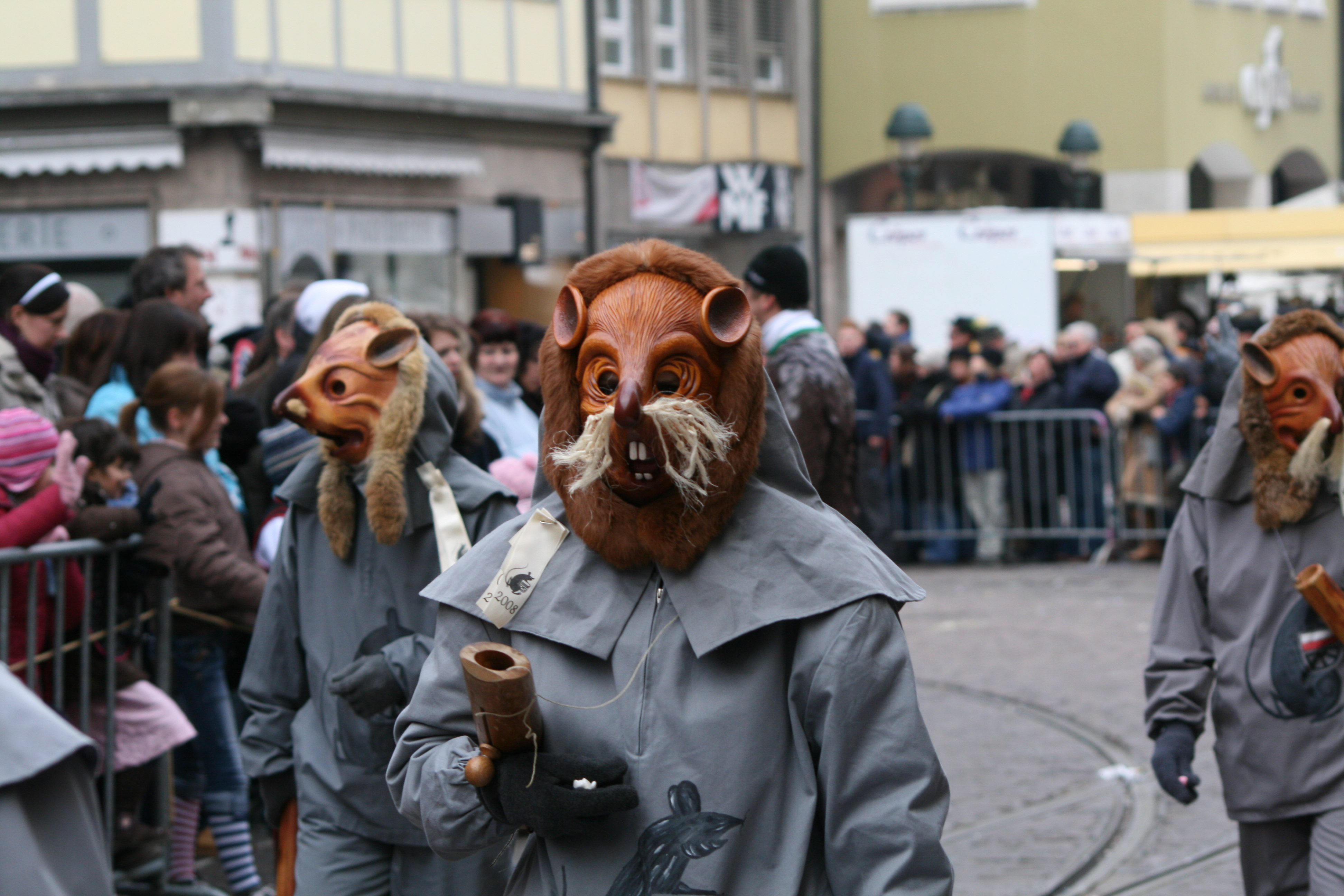 „Deichelmaus“ der Narrenzunft Deichelmaus 1445 e. V., Spaichingen (fotografiert in Freiburg i. Br. 2009)